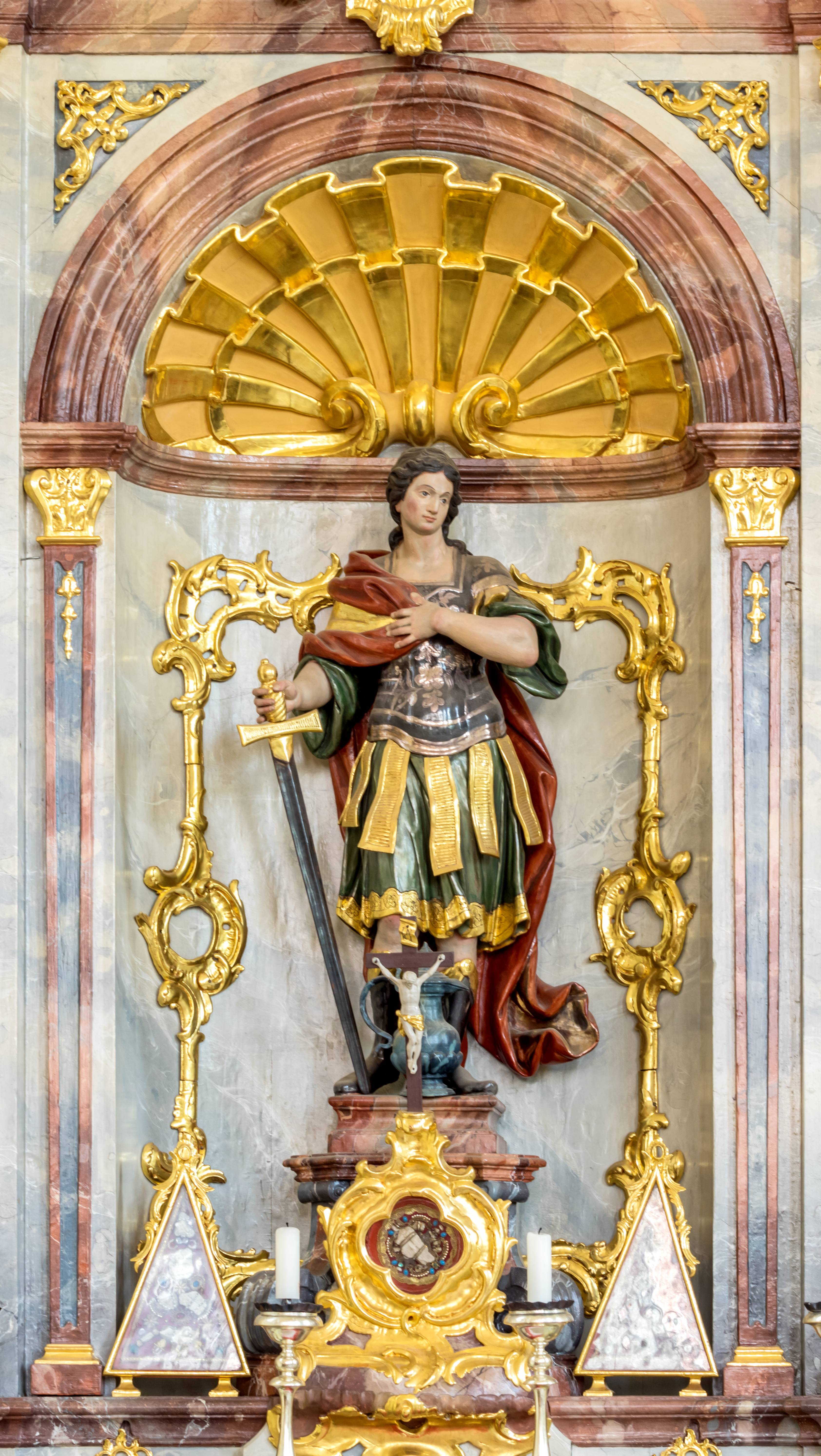 Bilder von der Kirche St. Romanus in Schweighausen St. Romanus im nördlichen Seitenaltar